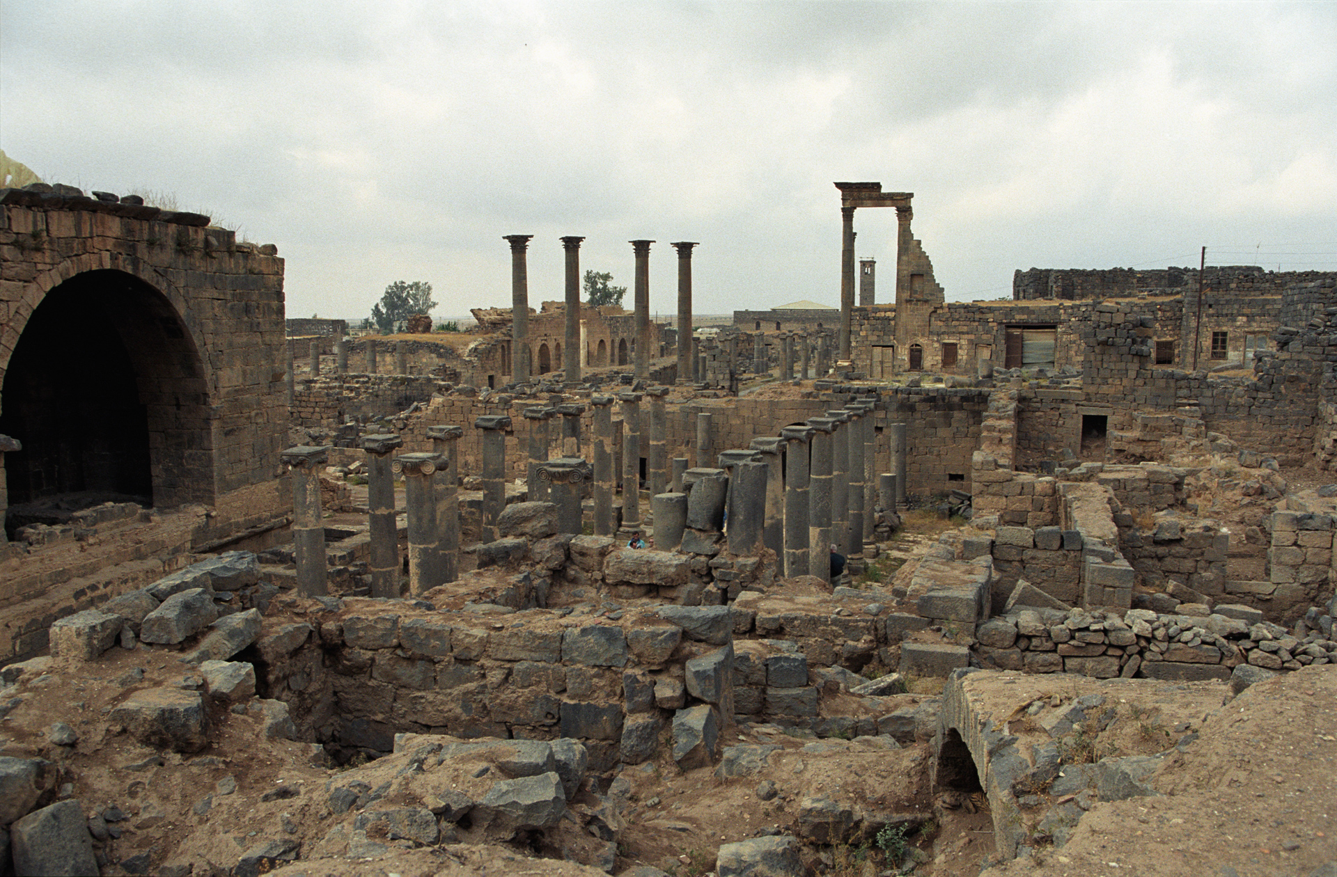 Syria, Bosra, Roman ruins